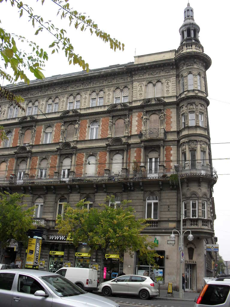 Gusztav Mahler Budapesti lakhelye